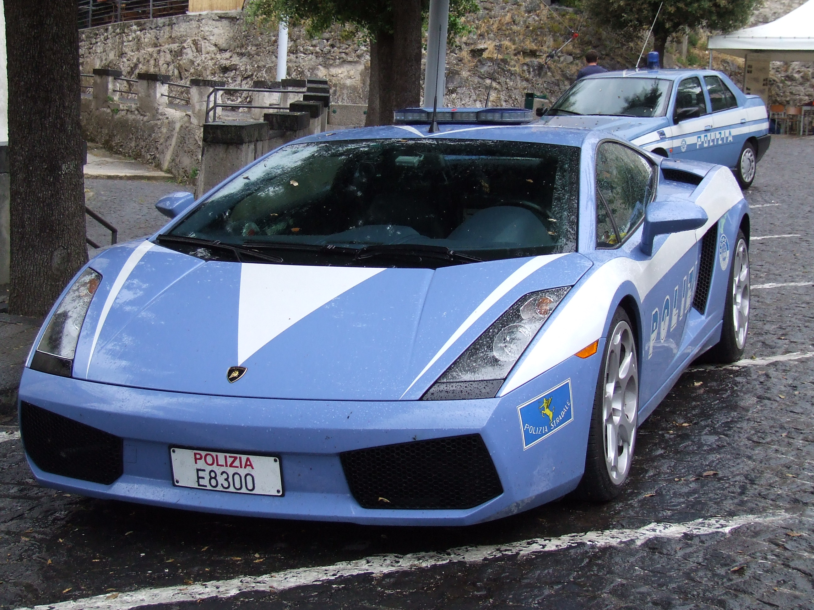 Lamborghini